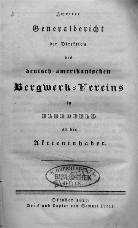 Titelblatt des zweiten Generalberichtes der Direktion des deutsch-amerikanischen Bergwerk-Vereins in Elberfeld an die Aktieninhaber, Oktober 1827